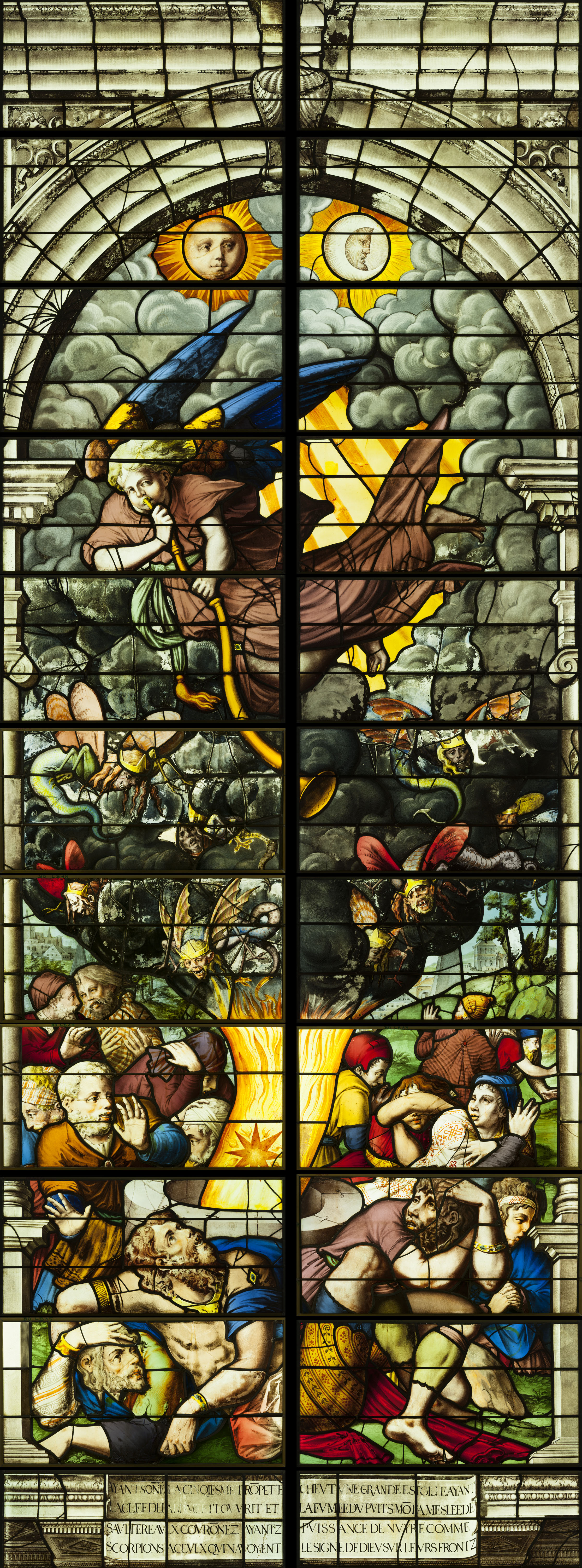 Montage présentant le registre supérieur de la verrière centrale (baie 0) de l'abside.